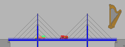 Schrägseilbrücke Harfenförmig